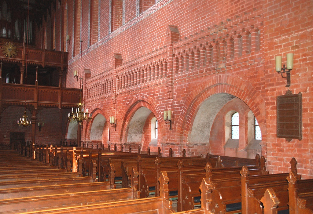 Seitenschiff des Klosters Sonnenkam in Neukloster